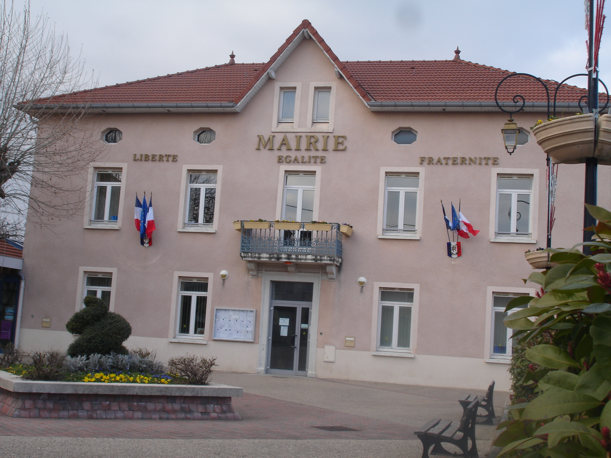 Valencin (38) : la mairie